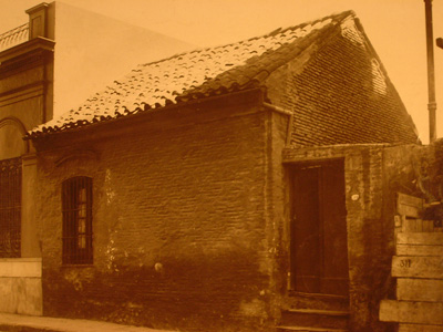 Construcción del barrio de San Telmo (Carlos Calvo 319) conocida como la Antigua Tasca de Cuchilleros, que data de fines del siglo XVIII. En la actualidad funciona allí un restaurante.